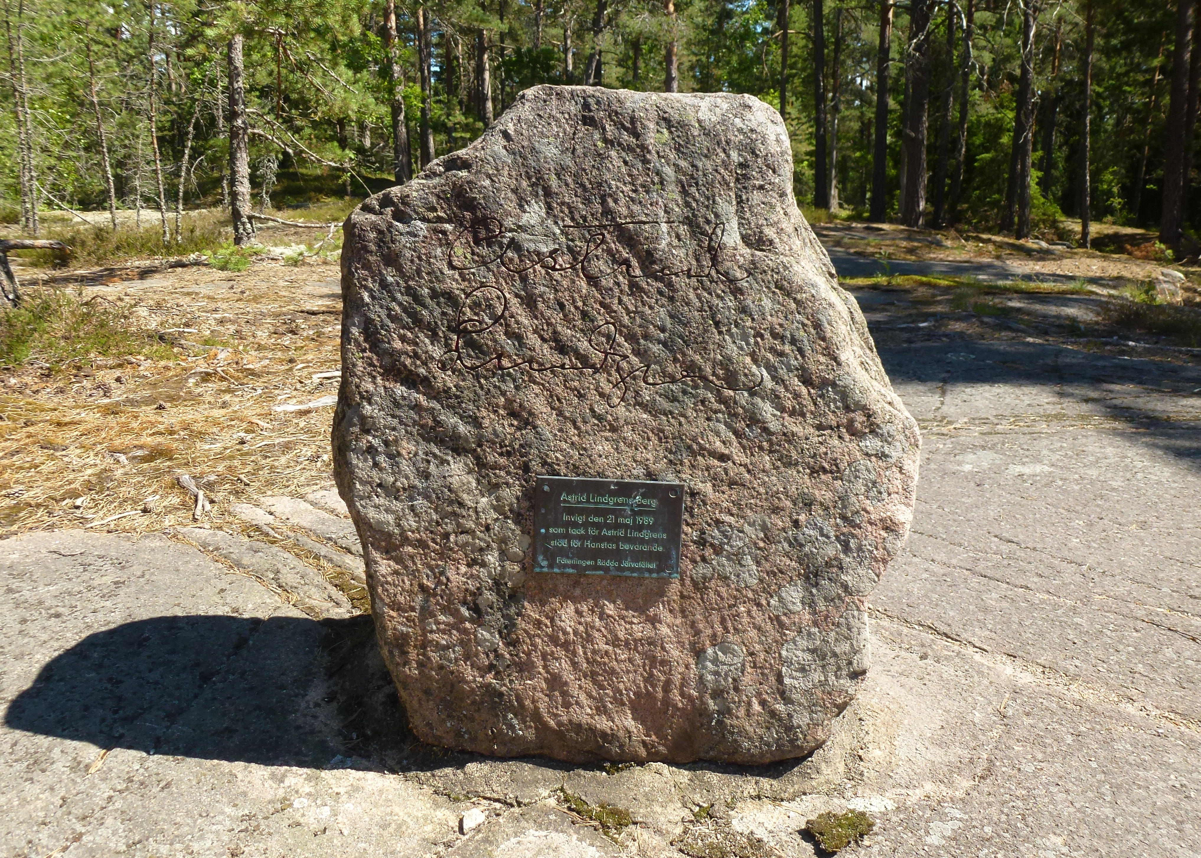 Hansta naturreservat med Astrid Lindgrens berg, minnessten